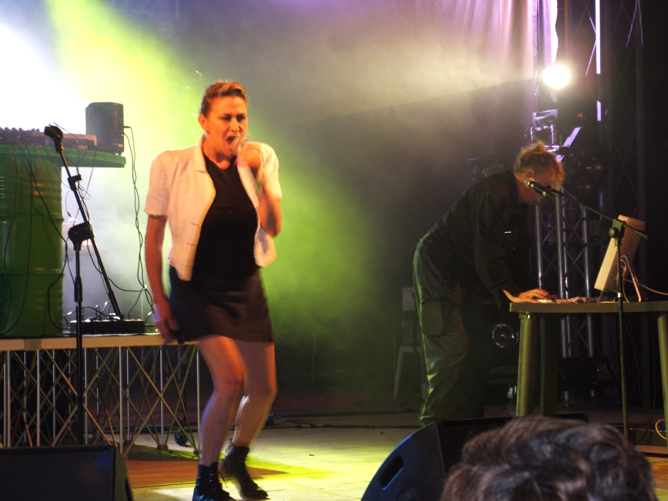 Krisma in concerto a Pasian di Prato (UD) il 9 giugno 2007.